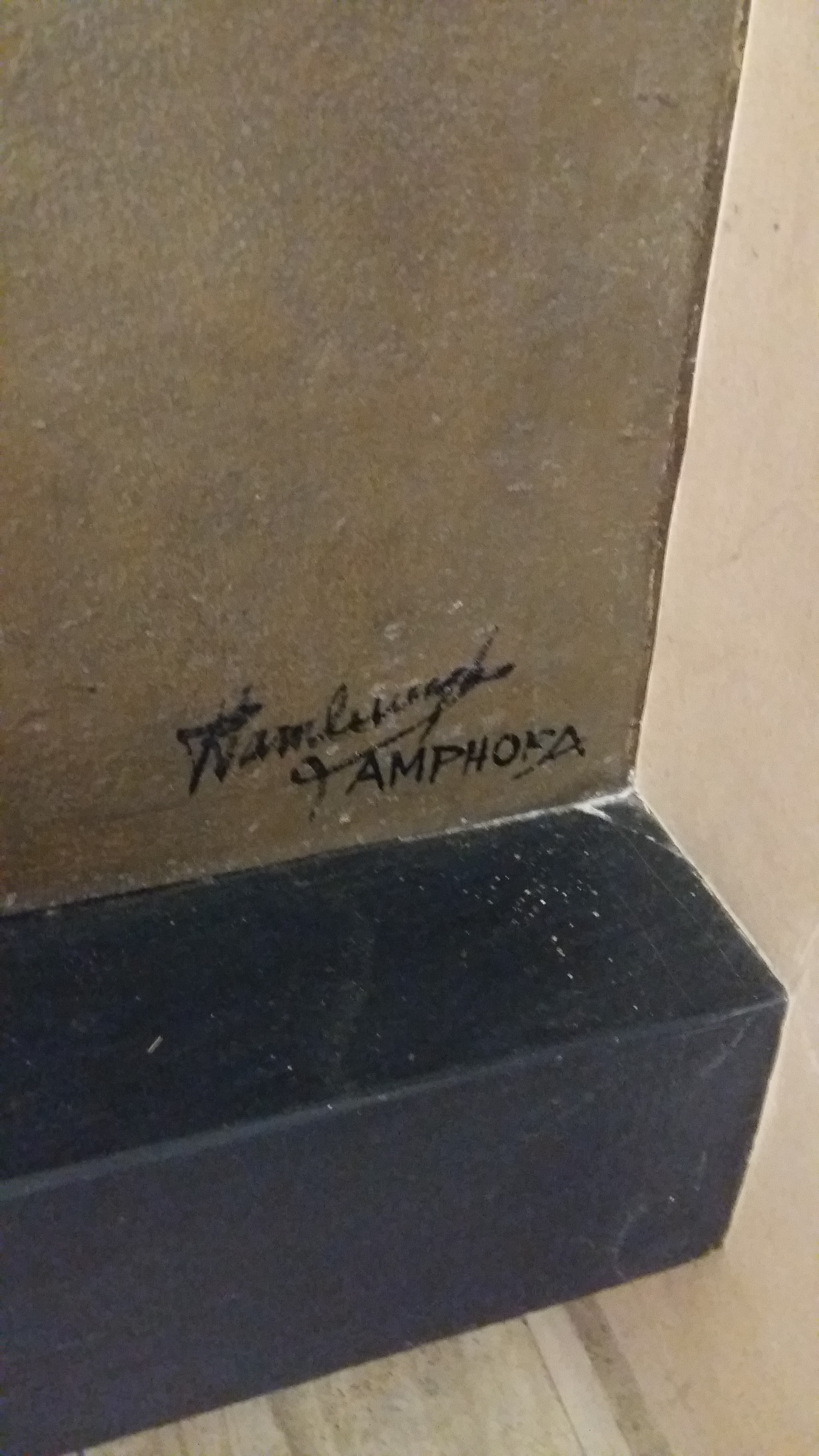 de schouw is gesigneerd door de heer Vandeweghe